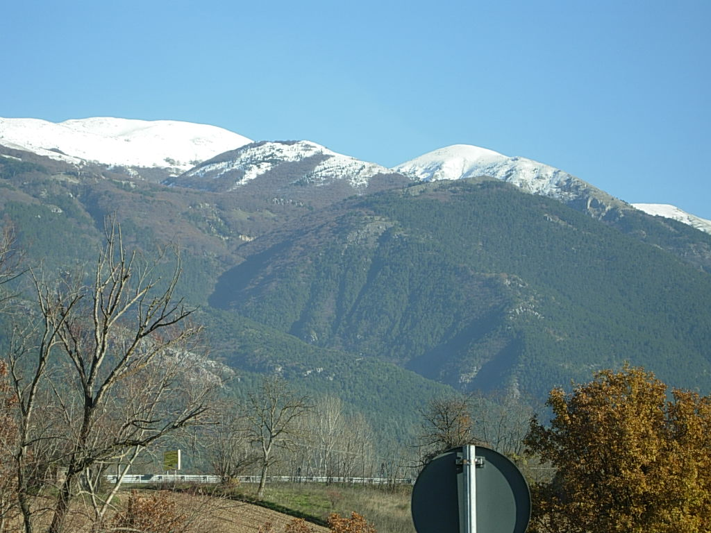 Monte Morrone (AQ) Foto personale